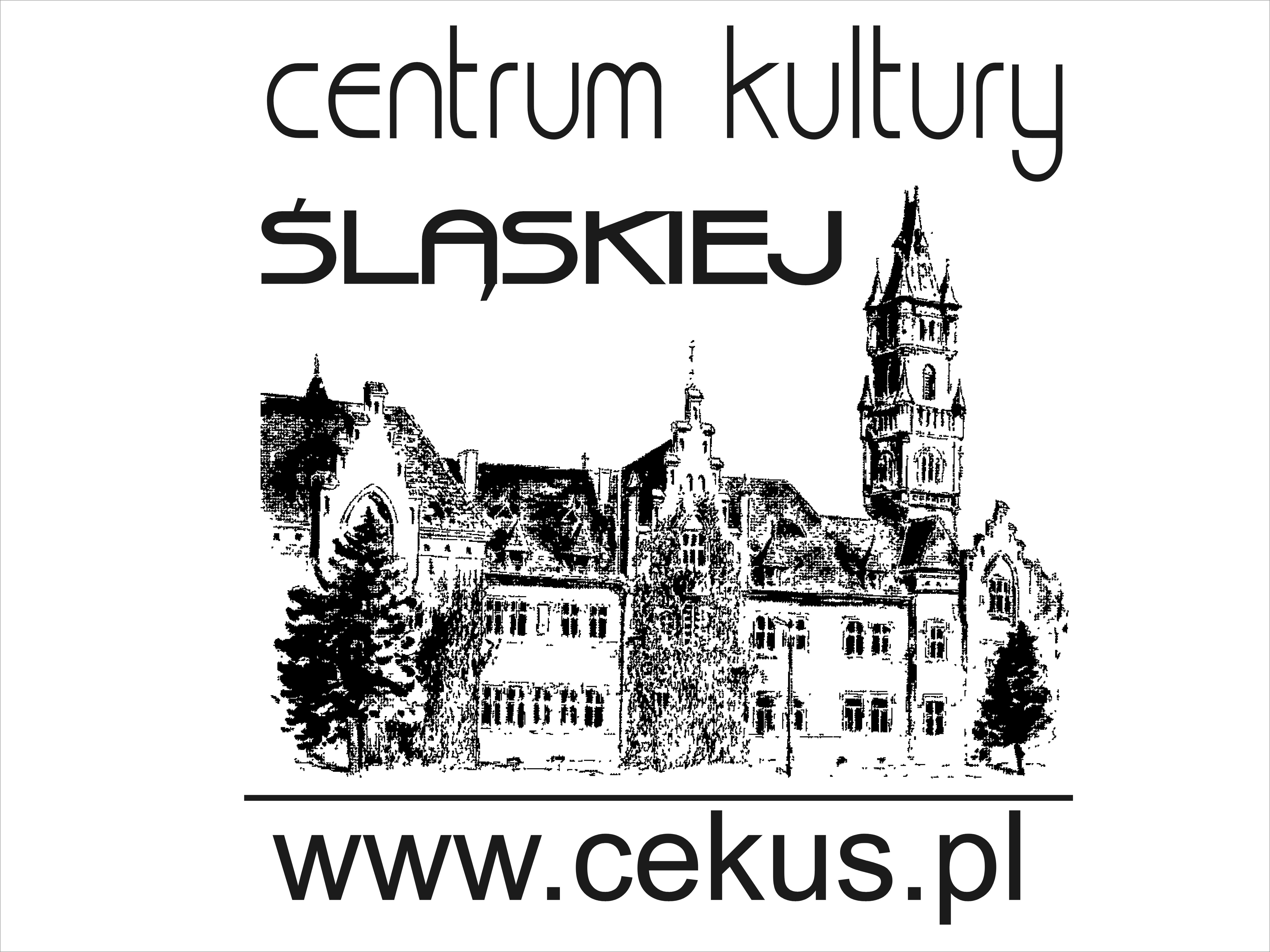 CeKuS.pl - stare logo